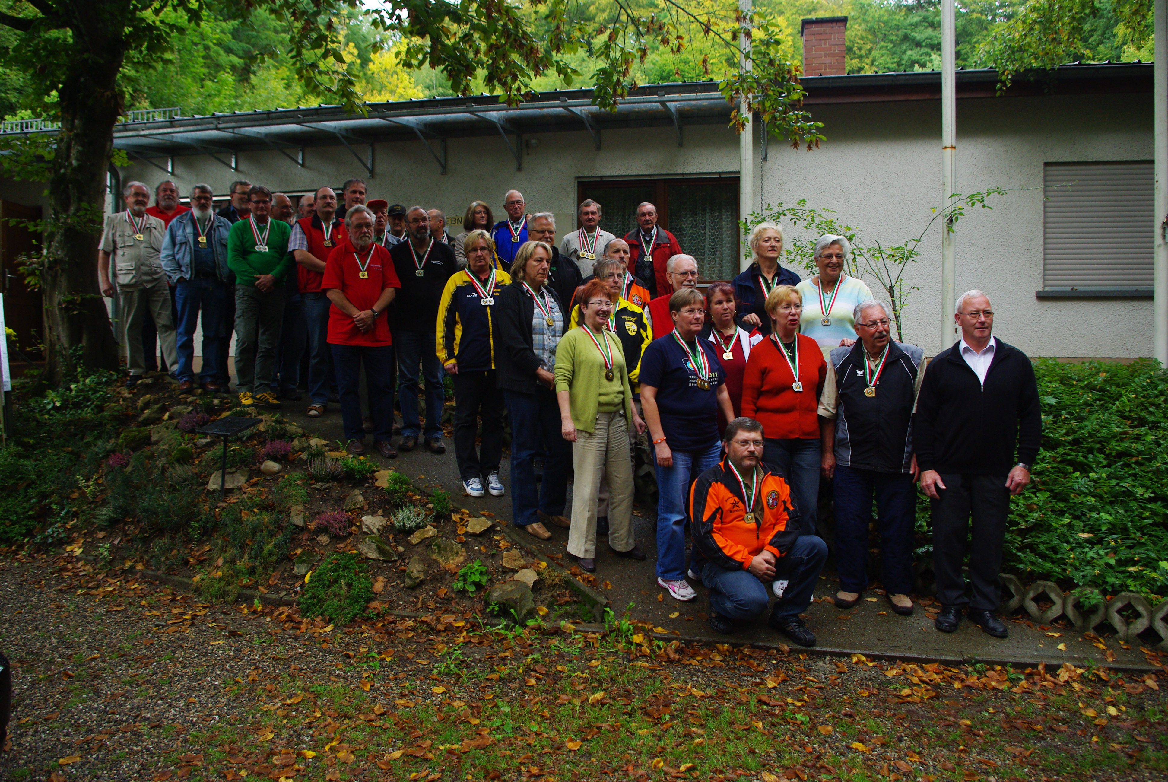 Alterschießen des SBSV in Müllheim 2011